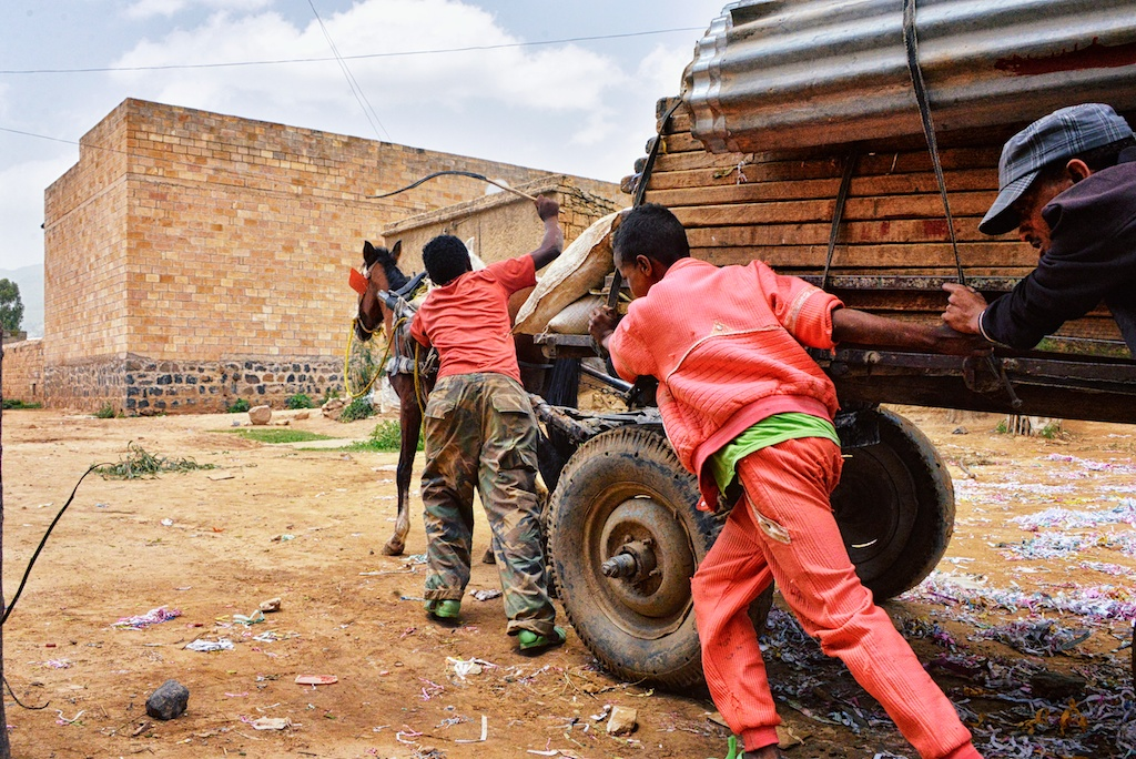 Adigrat